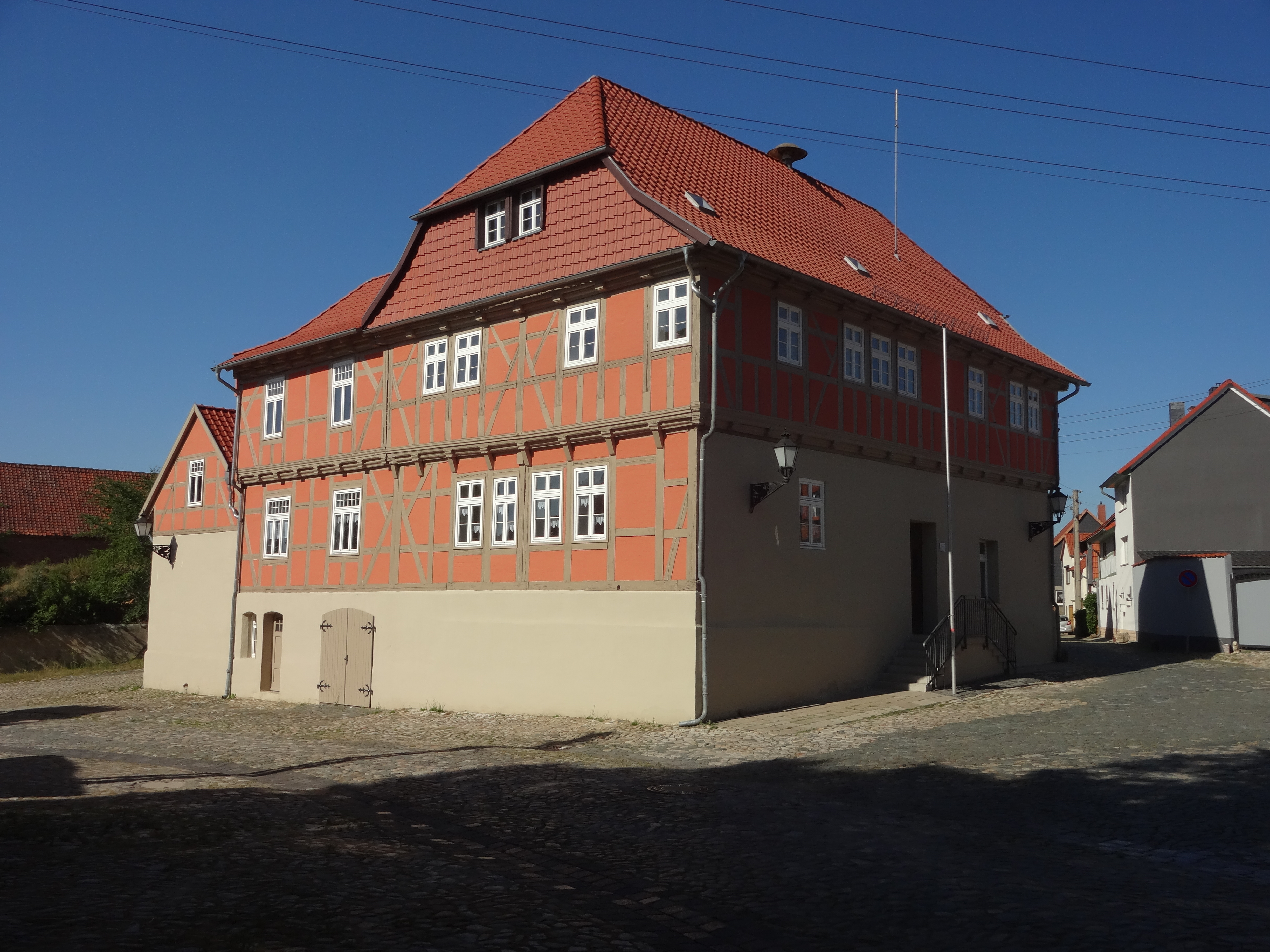 denkmalgeschüztes Rathaus Harsleben in der Langen Straße 15